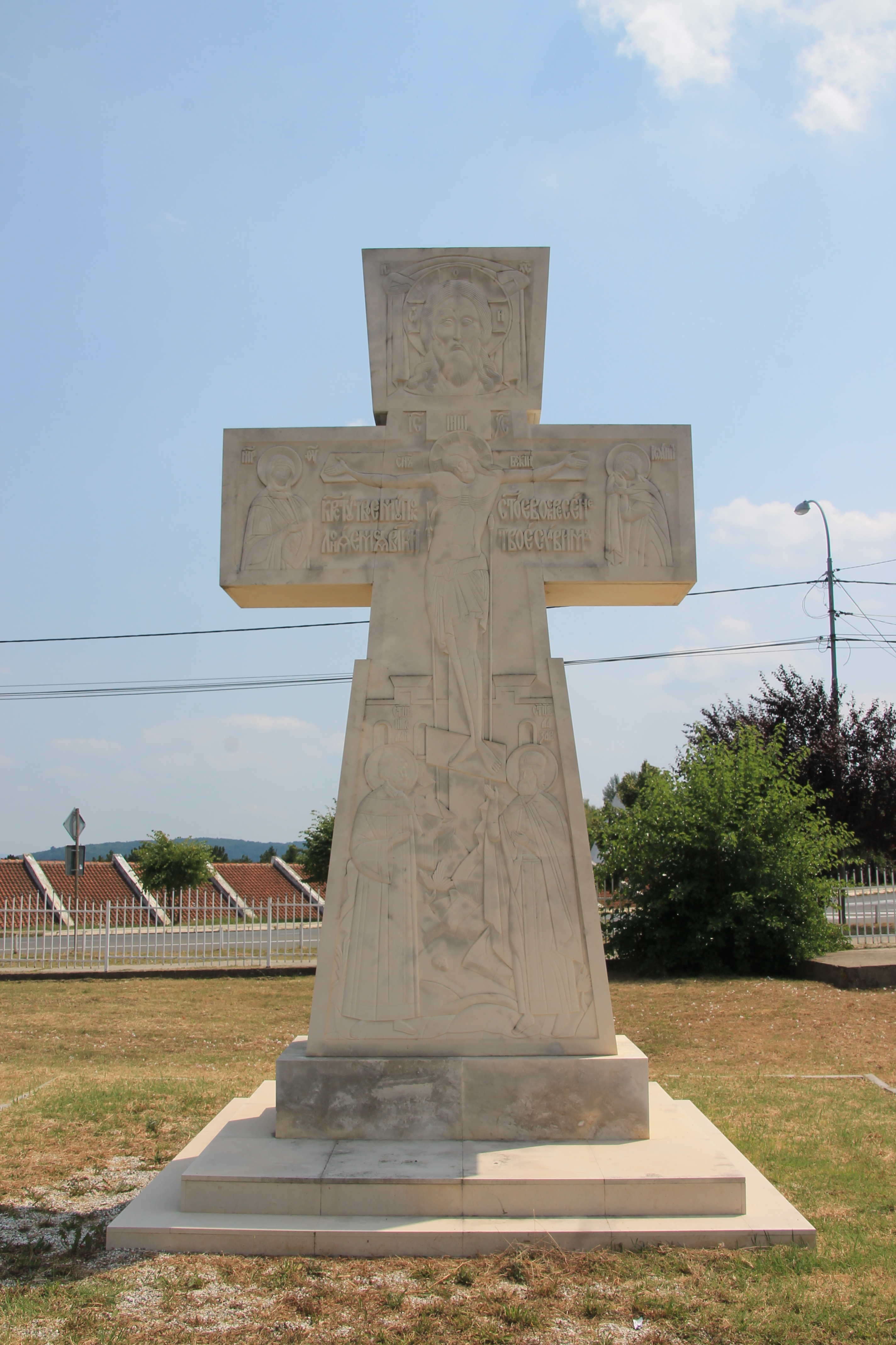 Poklonički krst